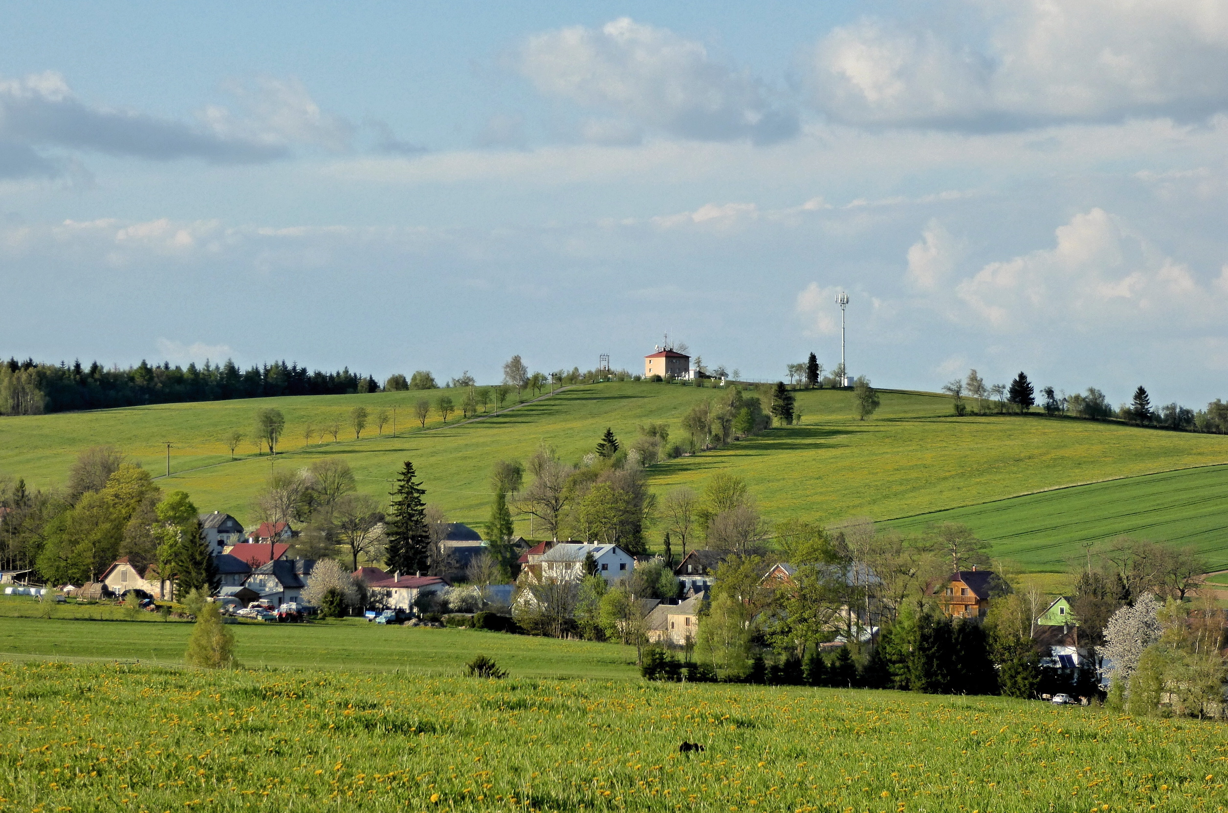 Otava, též Otavův kopec, je zeměpisné jméno (oronymum) vrcholu s nadmořskou výškou 734,5 m a výškový bod Hornosvratecké vrchoviny, ležící v její severozápadní části nazvané Žďárské vrchy, na území jejich severně situovaného geomorfologického okrsku Borovský les. Vrch (kopec) je součástí Chráněné krajinné oblasti Žďárské vrchy na severovýchodě Českomoravské vrchoviny. Zaměřený trigonometrický bod (č. 42 triangulačního listu 2420 České státní trigonometrické sítě) s názvem Otavův kopec a žulovým geodetickým označníkem s nivelací 734,49 m n.m. se nachází na okraji louky, u místní komunikace před objektem Meteorologické stanice Českého hydrometeorolgického ústavu (v záběru uprostřed), na katastrálním území obce Svratouch (okres Chrudim) v Pardubickém kraji České republiky.